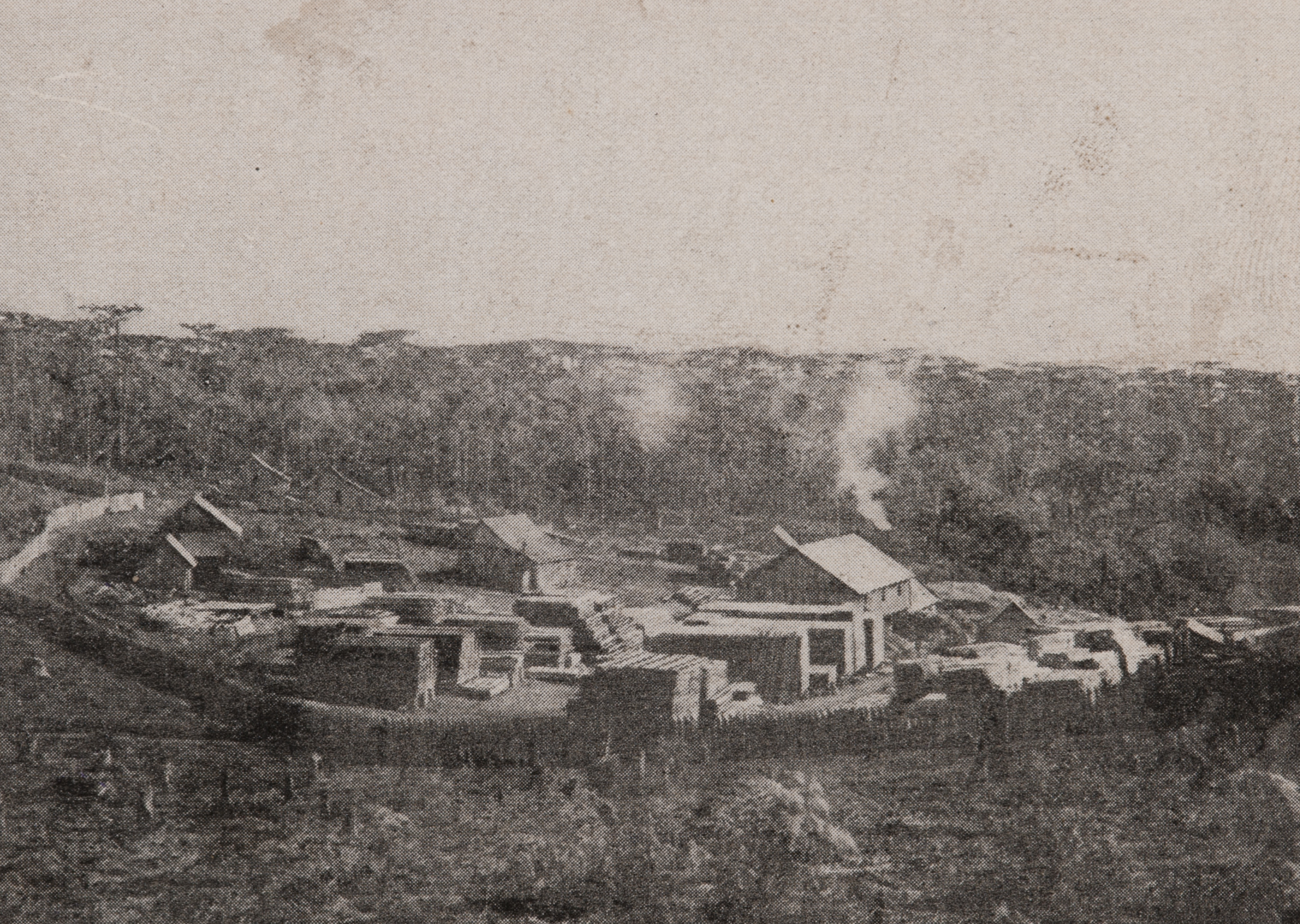 Obra que integra o acervo do Museu Paulista da USP. Coleção João Baptista de Campos Aguirra.